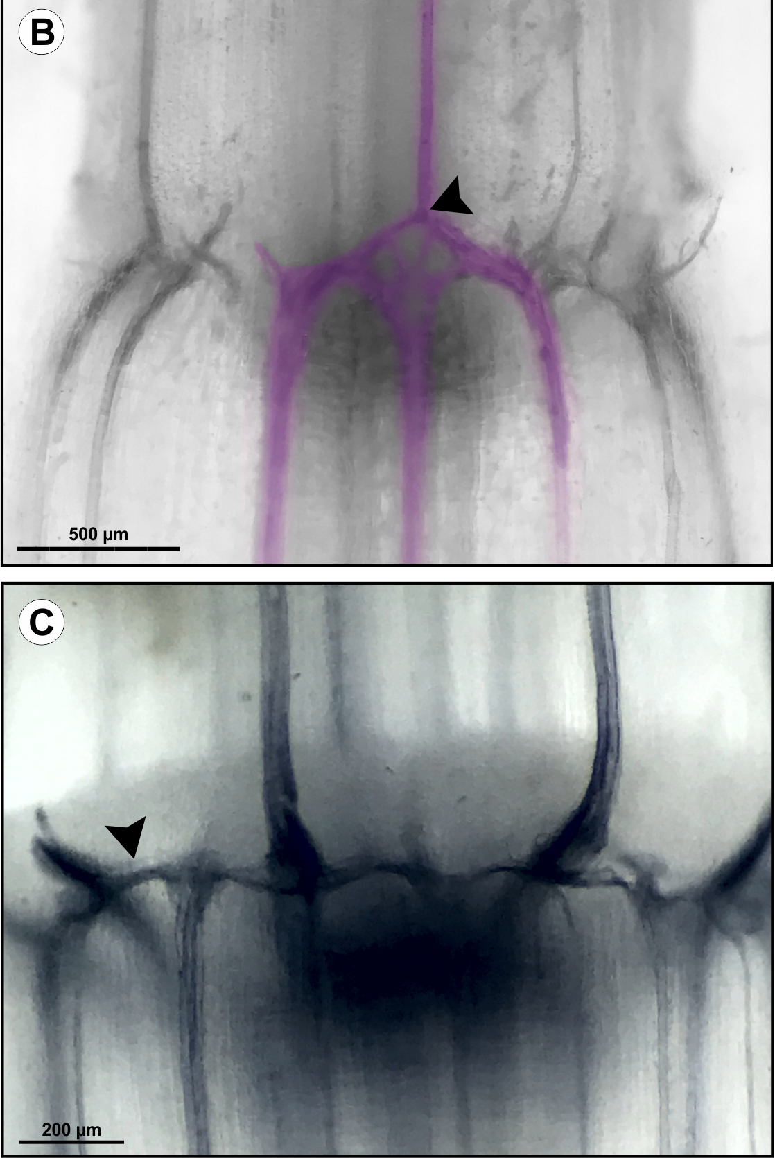 Fig 5. Diafanización de montura completa. En Tradescantia zebrina Heynh. ex Bosse (AB). B. Tenga en cuenta un haz del entrenudo anterior se conecta a dos haces del entrenudo debajo (punta de flecha). C. Es posible observar las conexiones transversales y oblicuas en el plexo vascular nodal externo (puntas de flecha). Coloreado digitalmente.